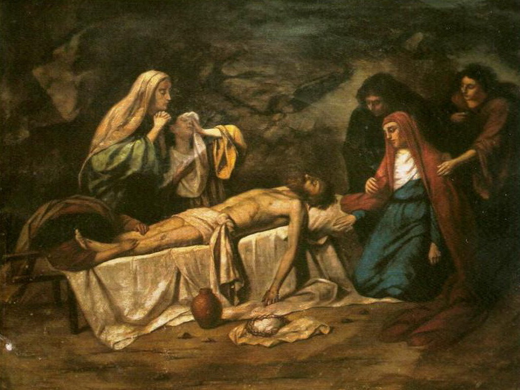 Wail